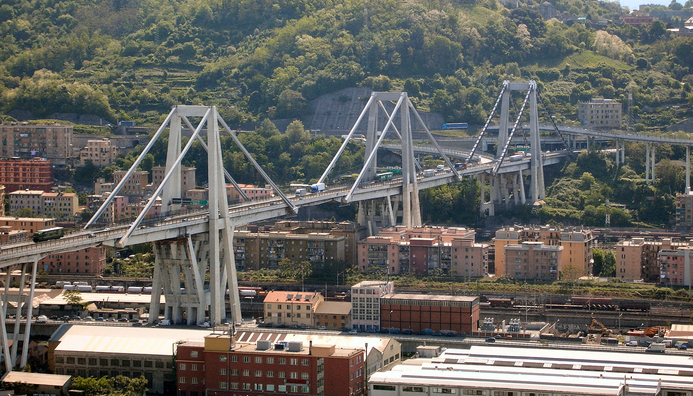 Genova - Veduta Ponte Morandi dalla collina di Coronata